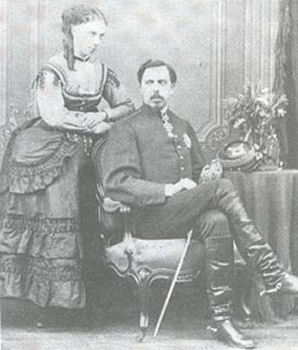 Carlos María de Borbón (1848-1909) y su esposa Margarita de Parma (1847-1893)